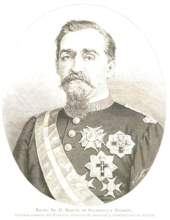 Excmo. sr. D. Manuel de Salamanca y Negrete, teniente general del ejército, director de Sanidad y Administración militar.